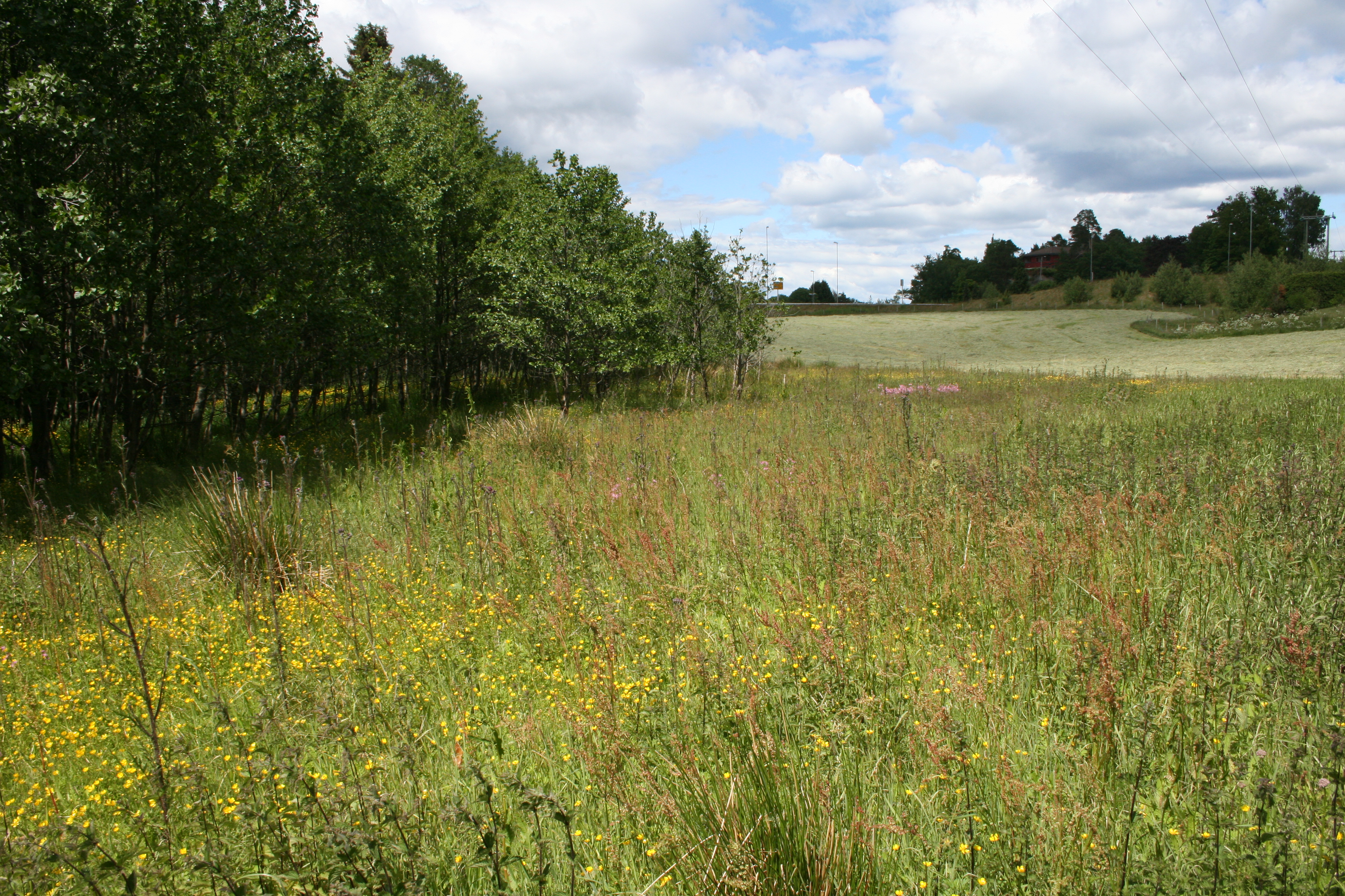 Kulturlandskap natureng.